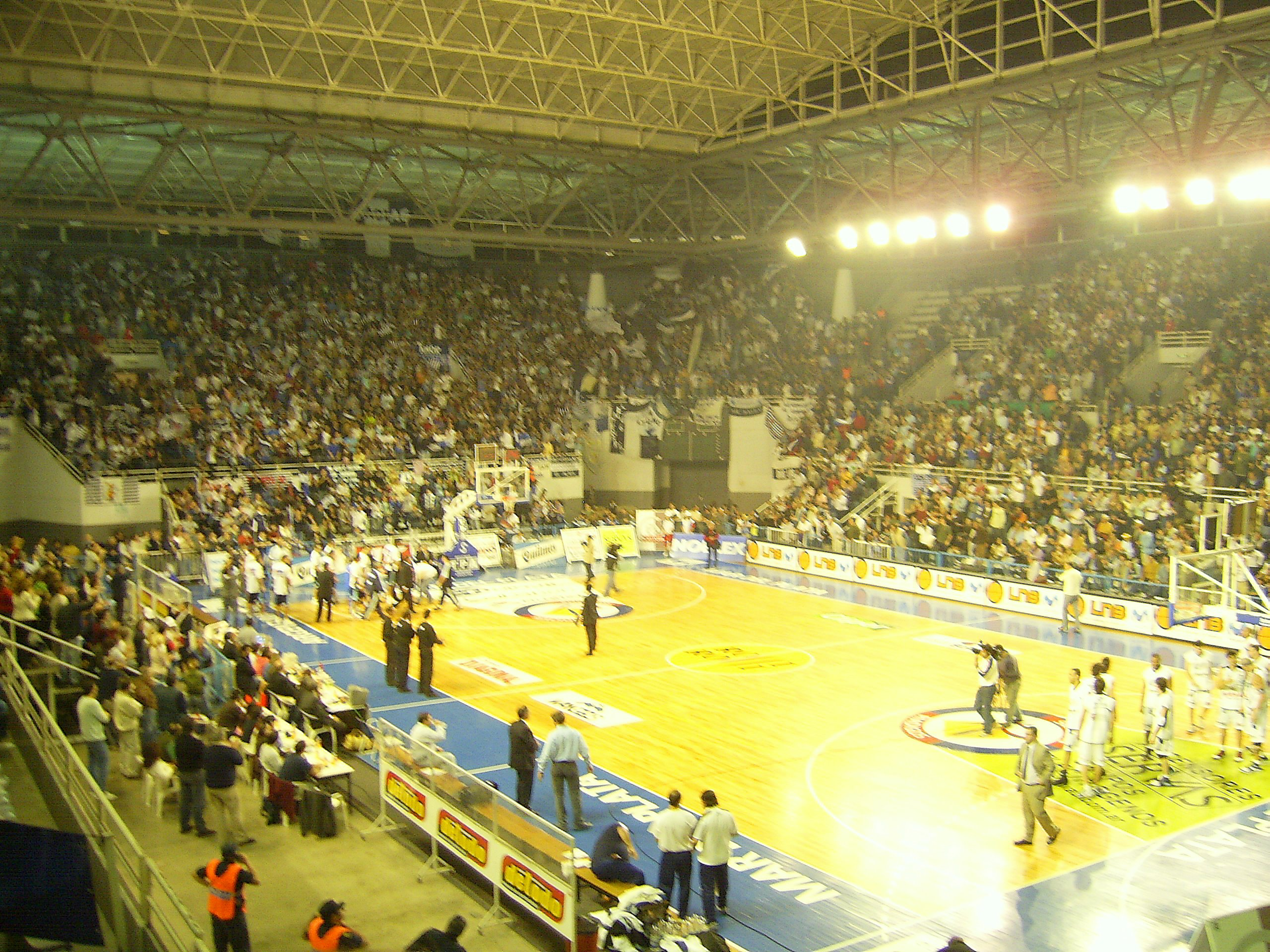 El Estadio Polideportivo Islas Malvinas en un partido de Peñarol ante más de 6000 fanáticos